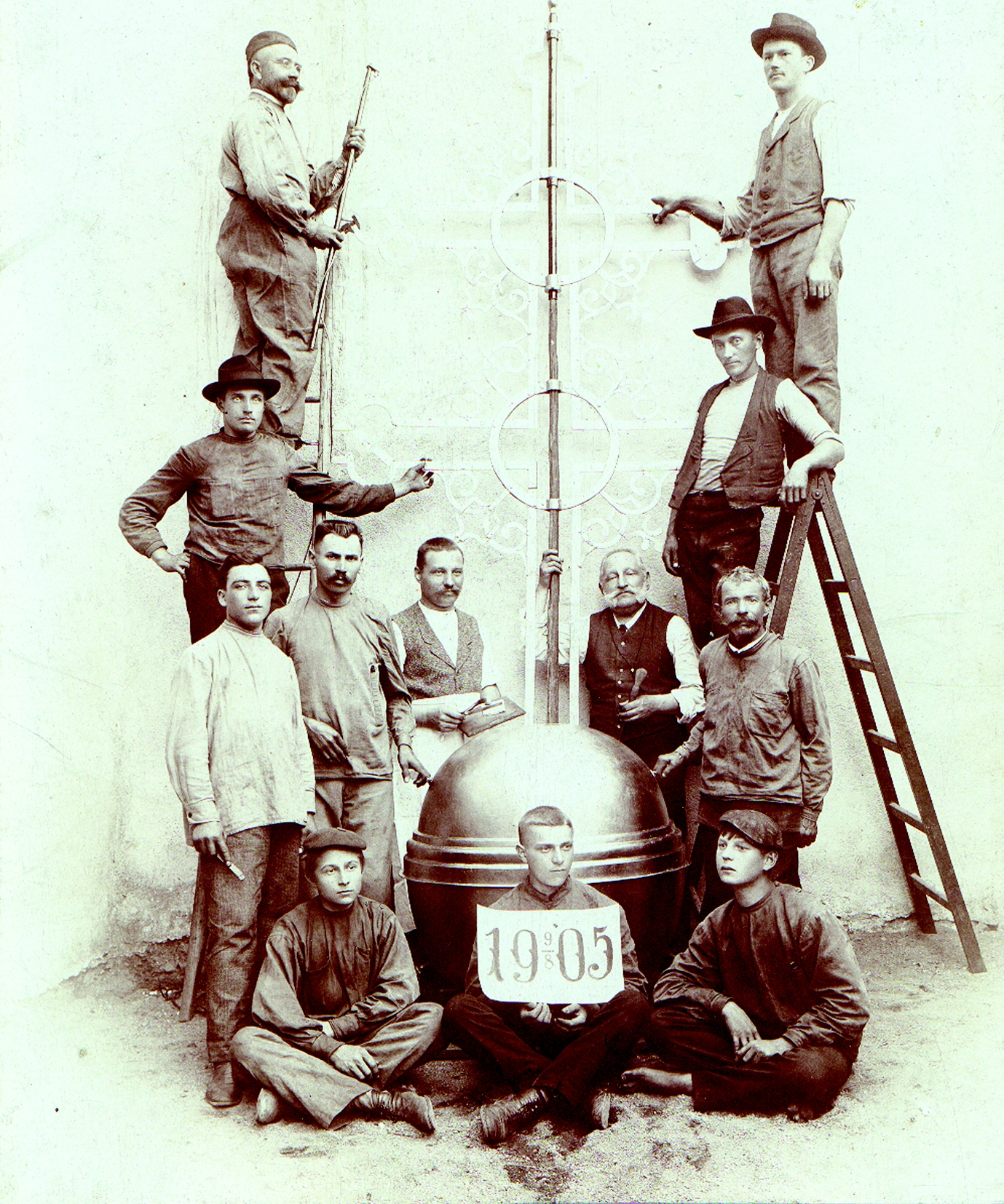 Kříž z vrcholu městské věže v Třebíči vyrobený roku 1862, zachycen pří rekonstrukci v roce 1905